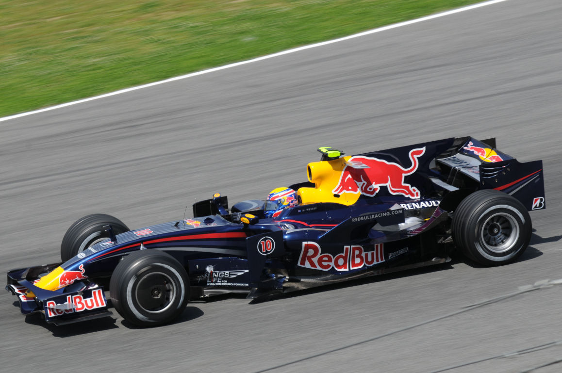 Mark Webber im Red Bull während des freien Trainings zum Grossen Preis von Spanien 2008